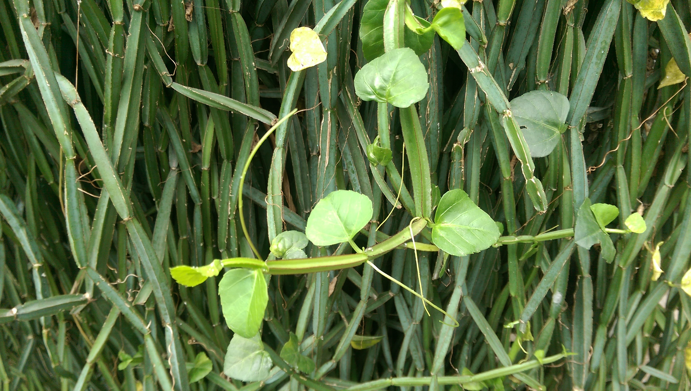 Dây chìa vôi bốn cạnh, hồ đằng bốn cạnh